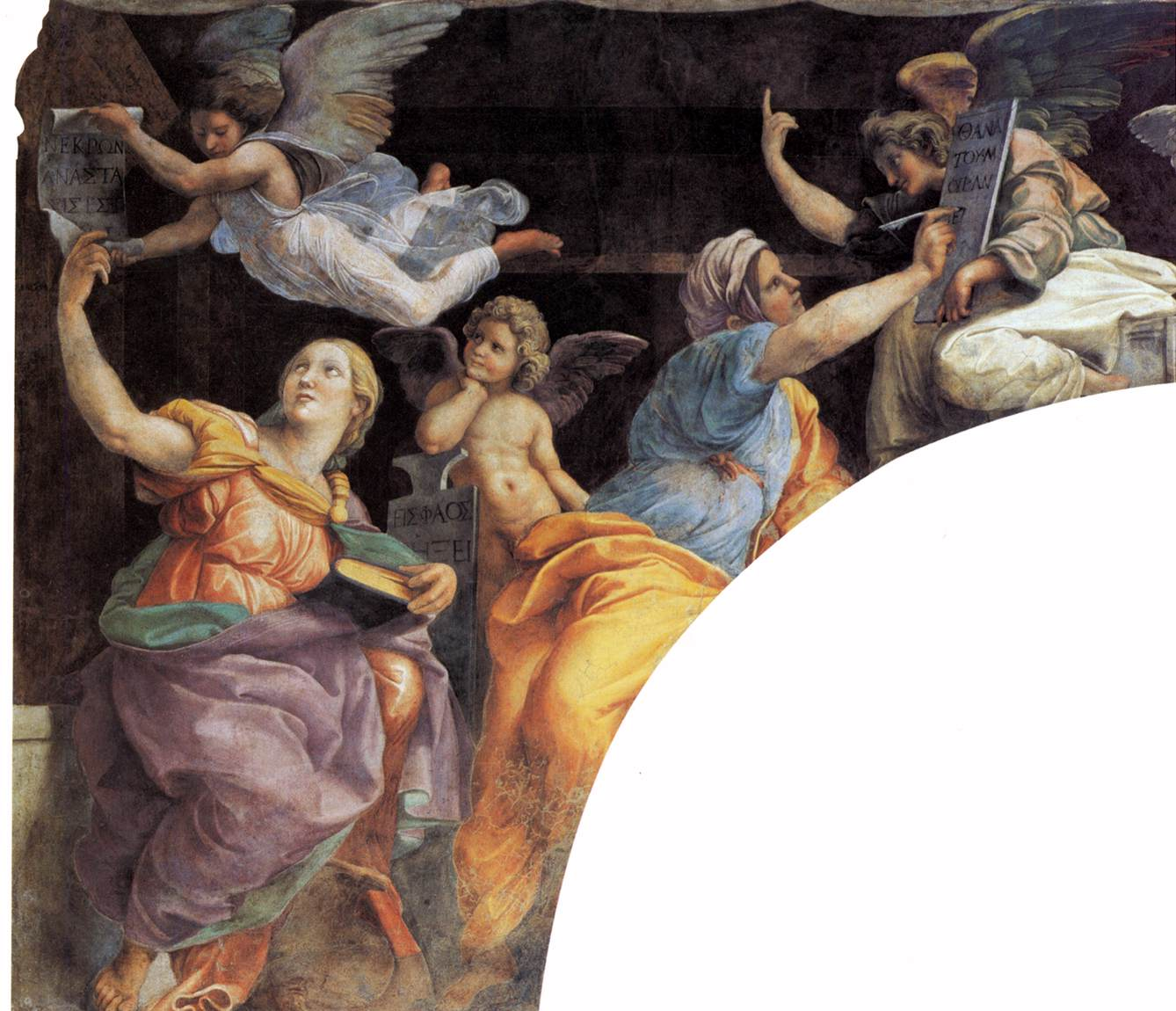 detail